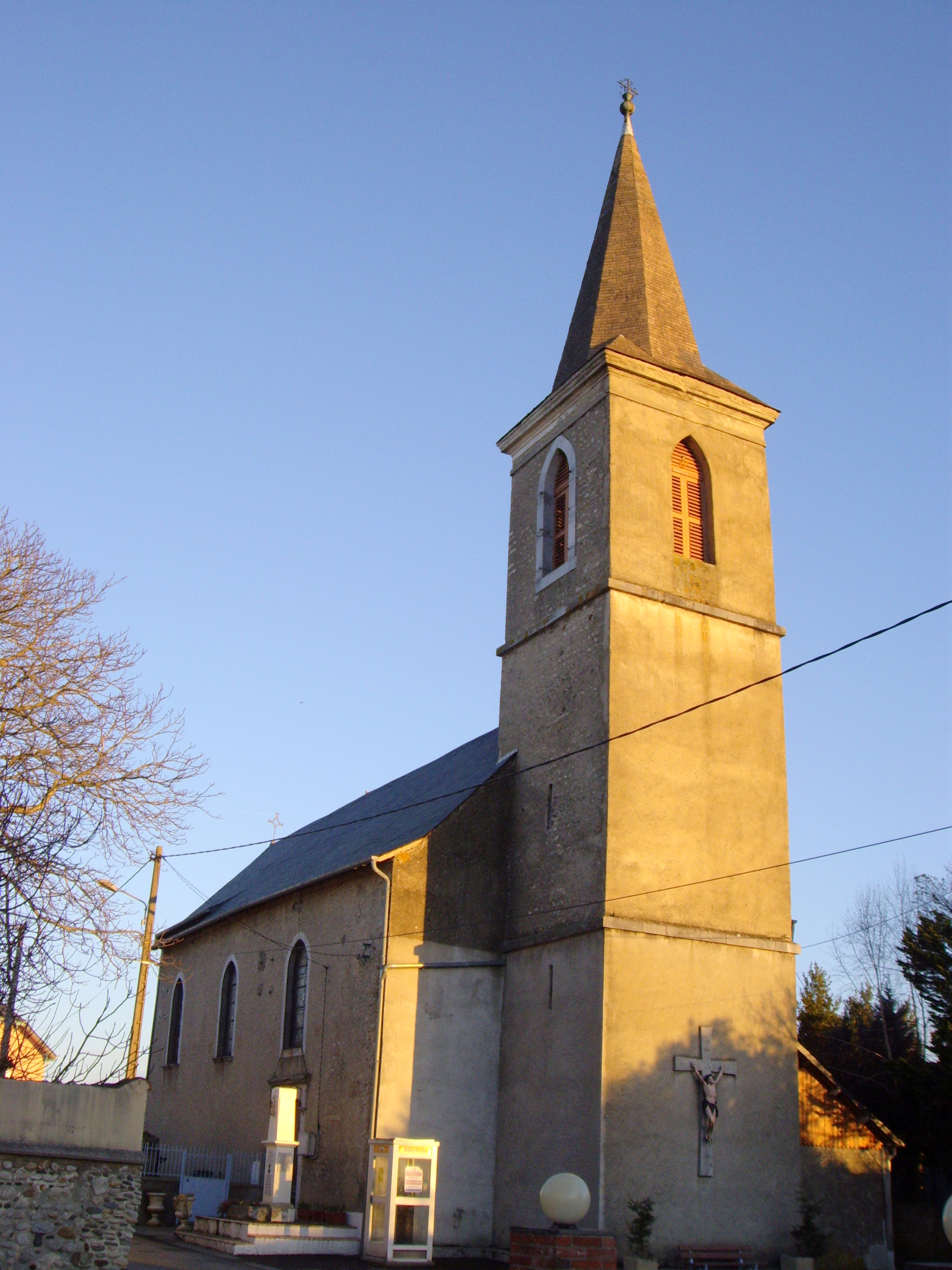 Église de Saint-Martin (65)